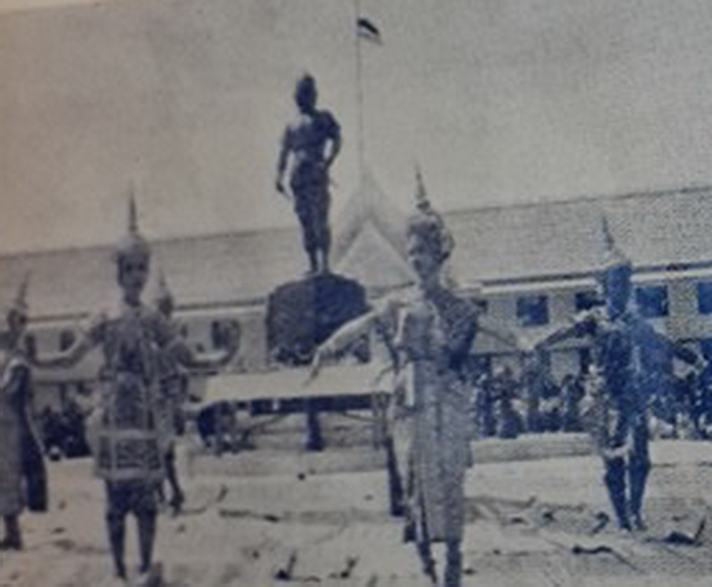 ภาพพิธีอัญเชิญดวงวิญญาณพระยาพิชัยดาบหัก พิธีพราหมณ์ ในพิธีปลุกเศกเหรียญพระยาพิชัยดาบหัก ณ ปรำพิธีหน้าศาลากลาง จังหวัดอุตรดิตถ์ 31 มกราคม 2513